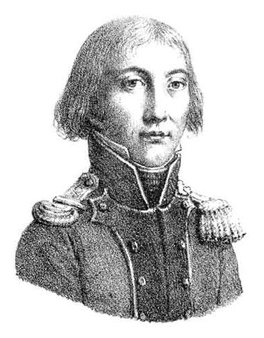 Claude-Antoine Prieur-Duvernois, Coll. Ecole polytechnique